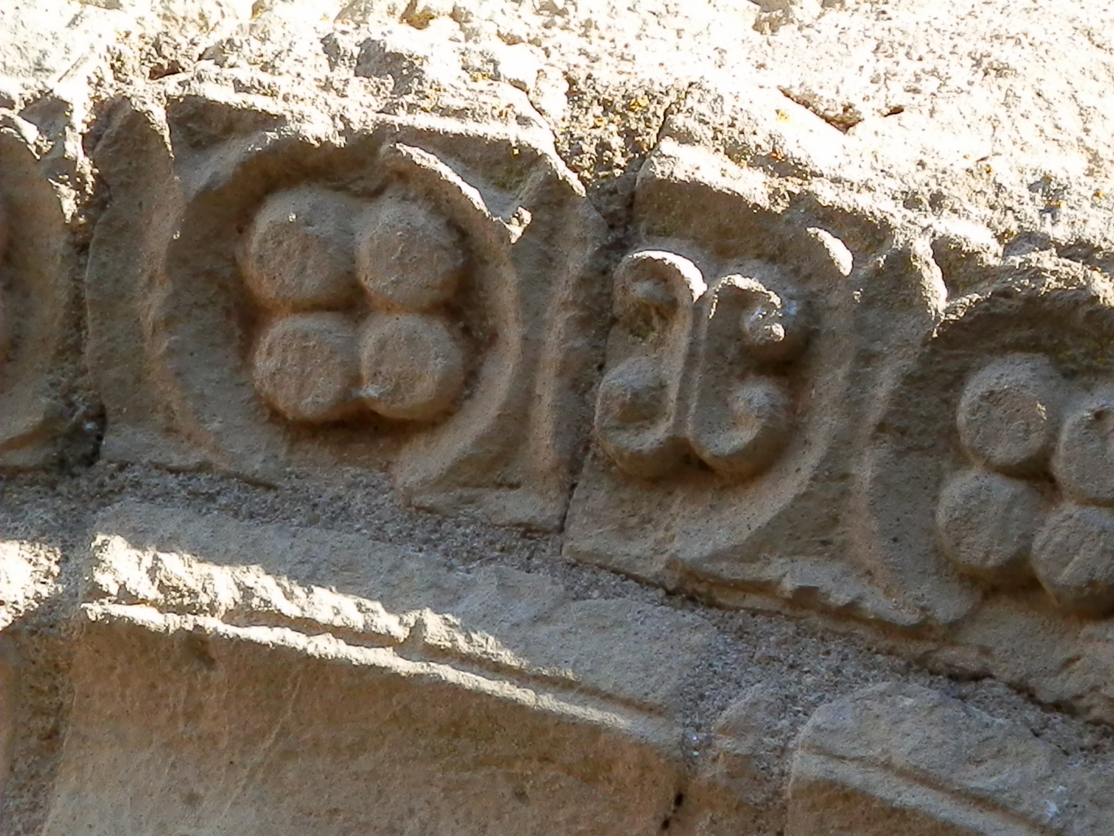 Détail du décor sculpté de la façade du prieuré de Drevant (Cher)